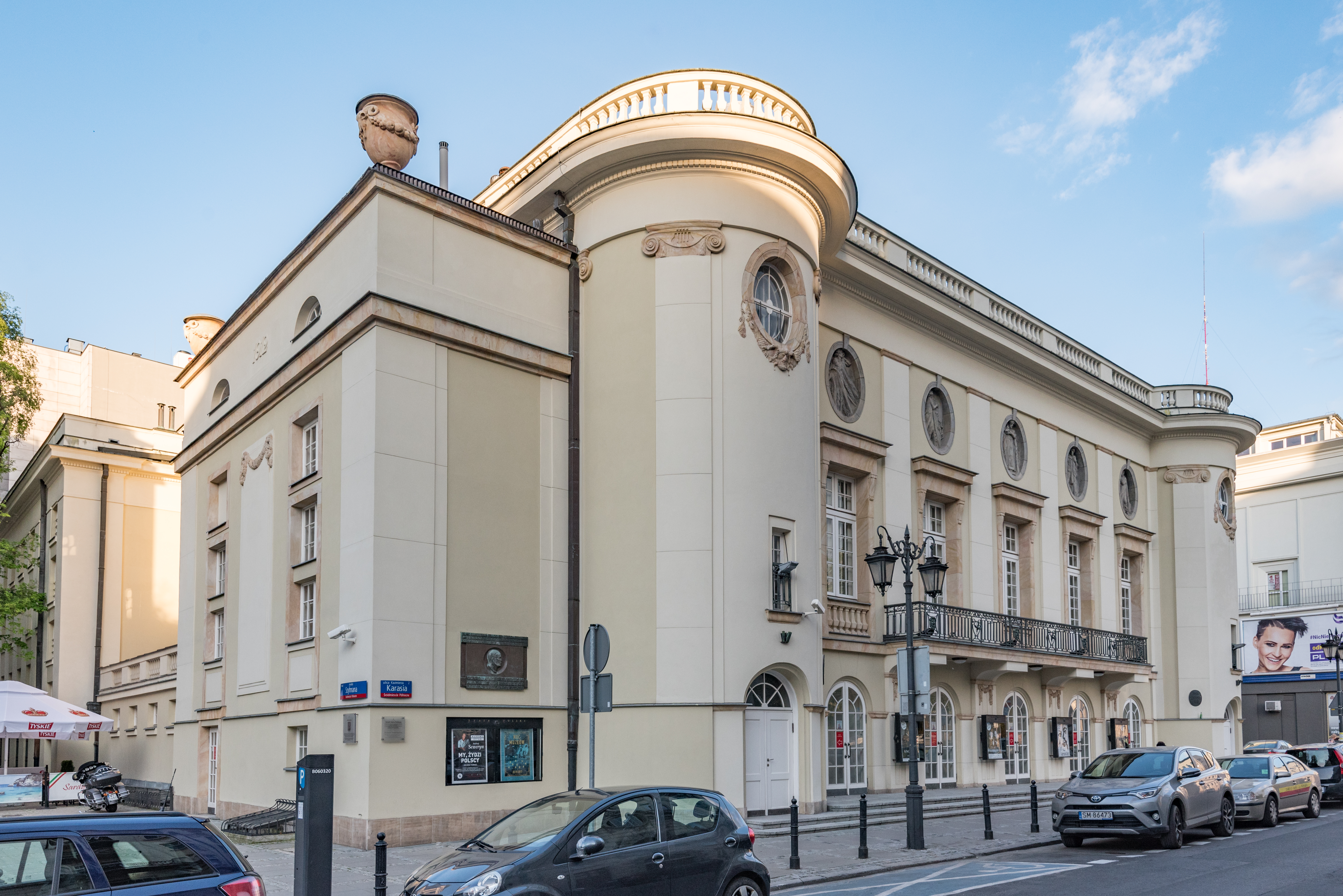 Warszawa, ul. Karasia 2